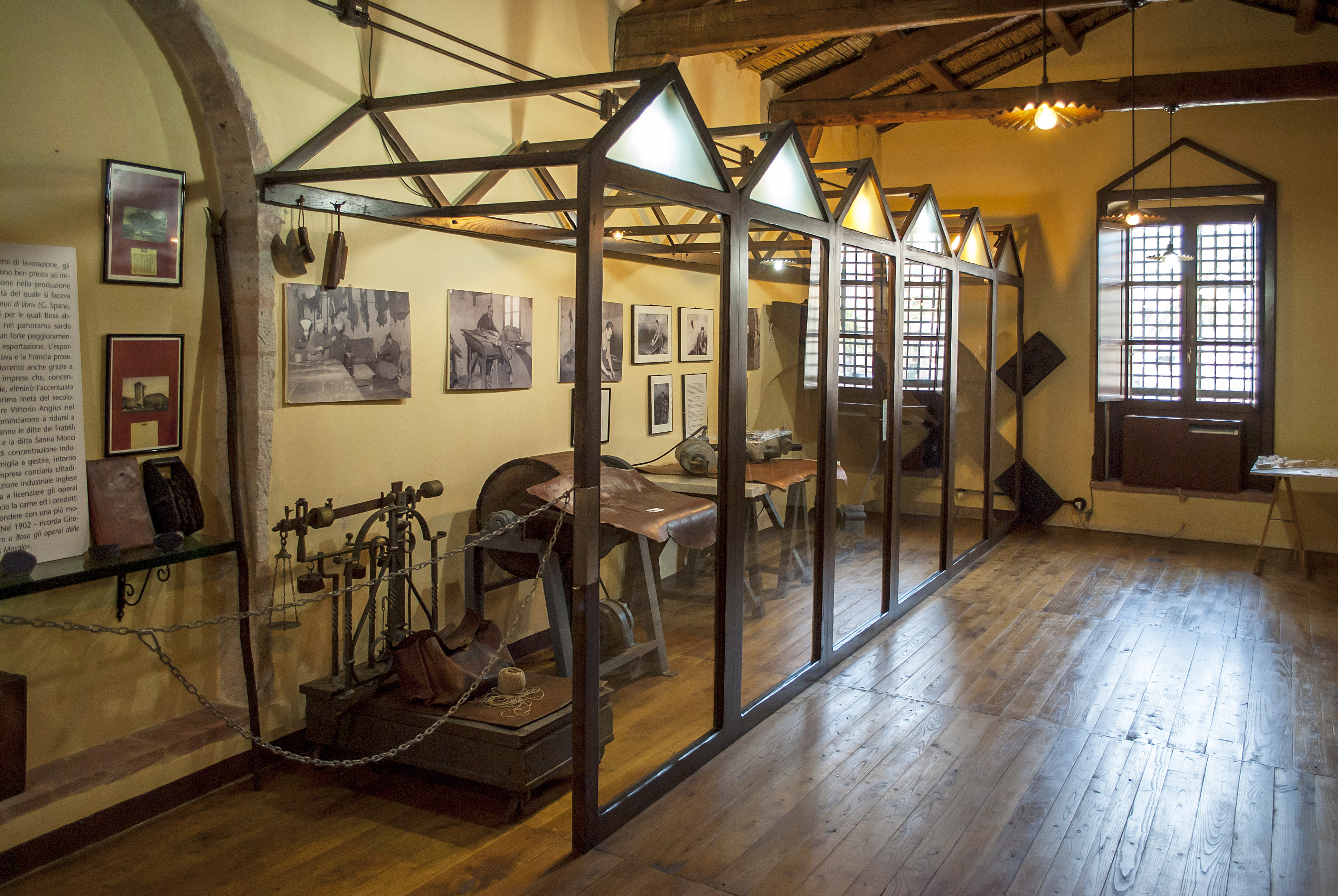 Museo delle Conce This is a photo of a monument which is part of cultural heritage of Italy.